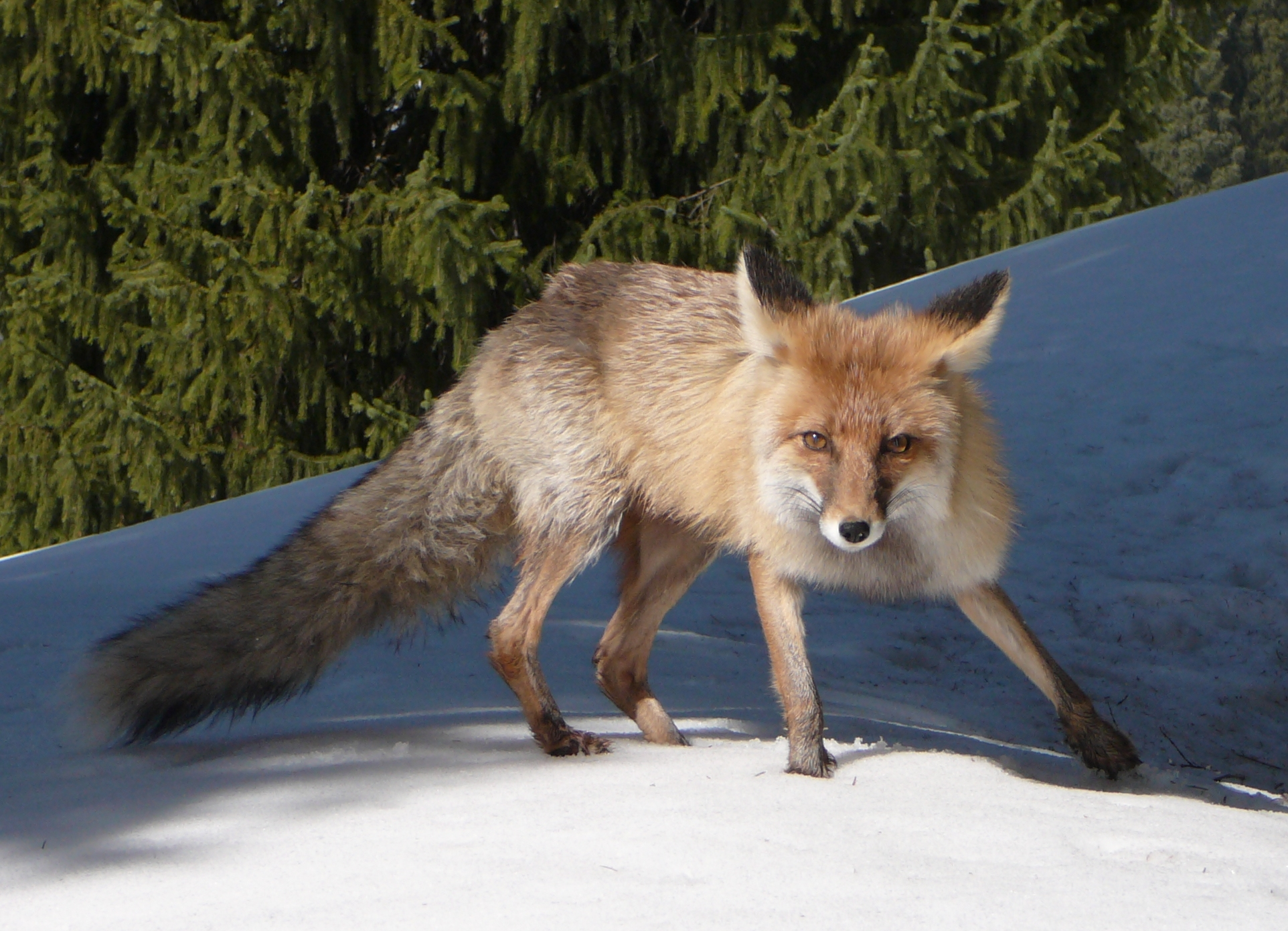 Лисица, прикормленная туристами. Снято в ущелье Туюк-Су в двух километрах выше горнолыжного комплекса "Чимбулак" в 20 километрах от Алма-Аты Видеоролик с кормлением лисицы на